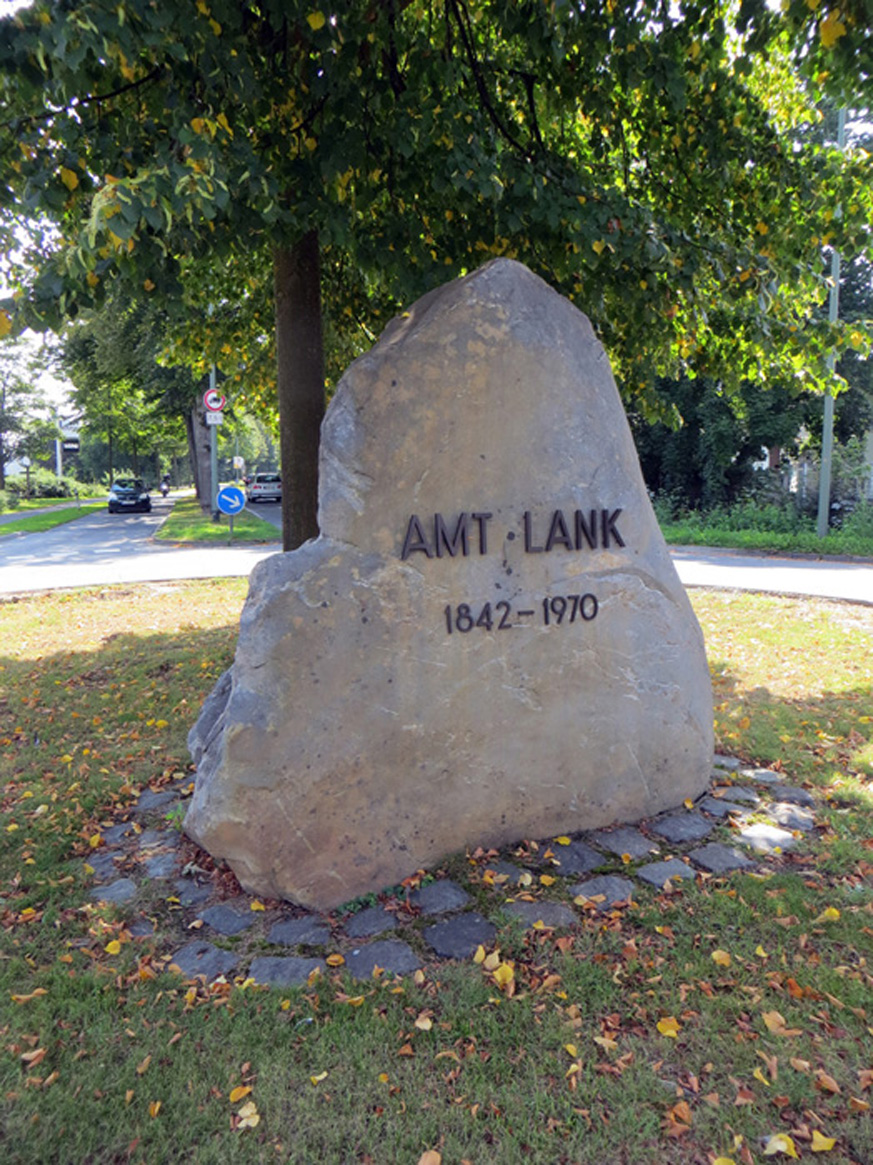 Amt Lank